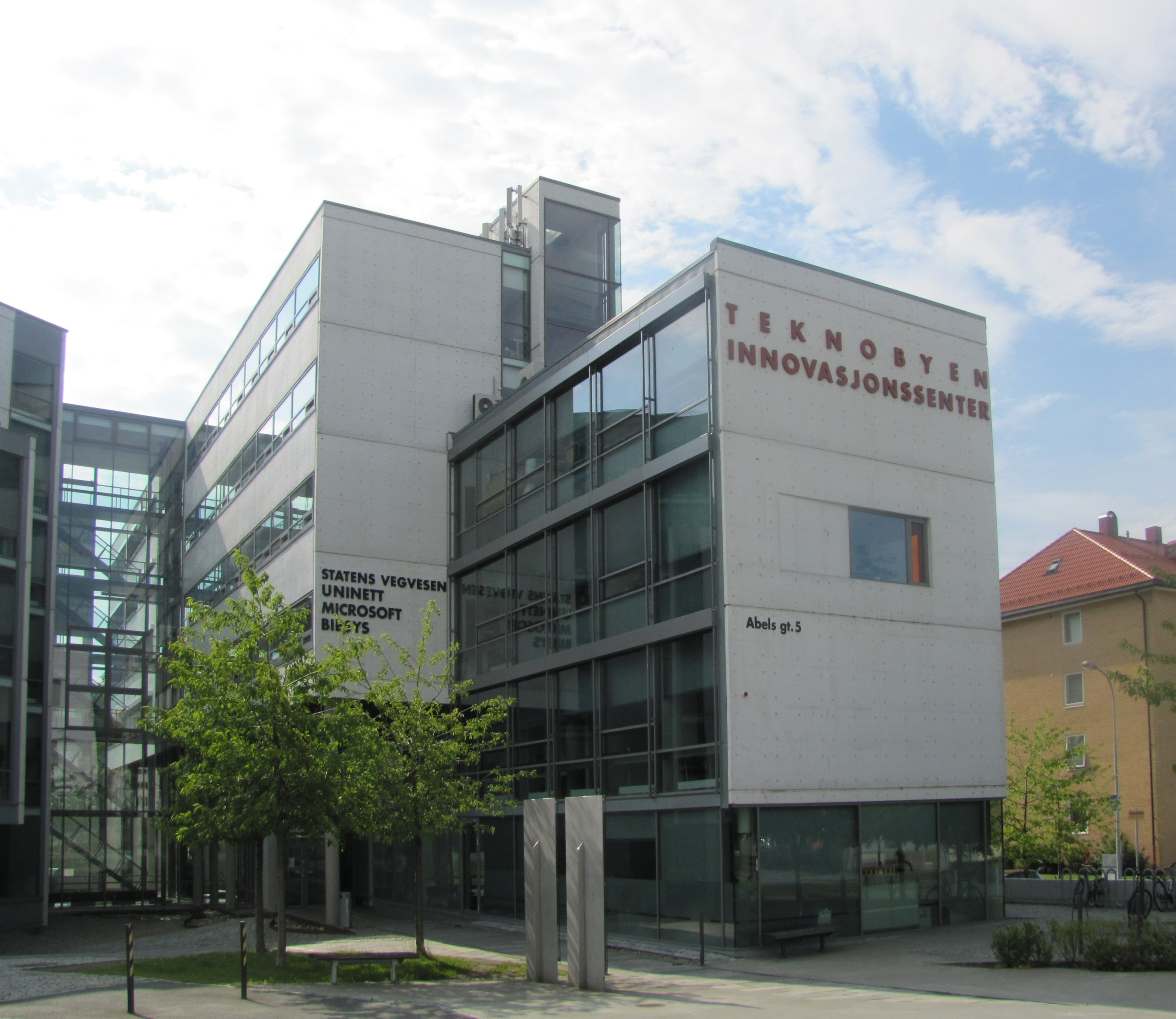 Teknobyen Innovasjonssenter, Abels gate 5, Trondheim